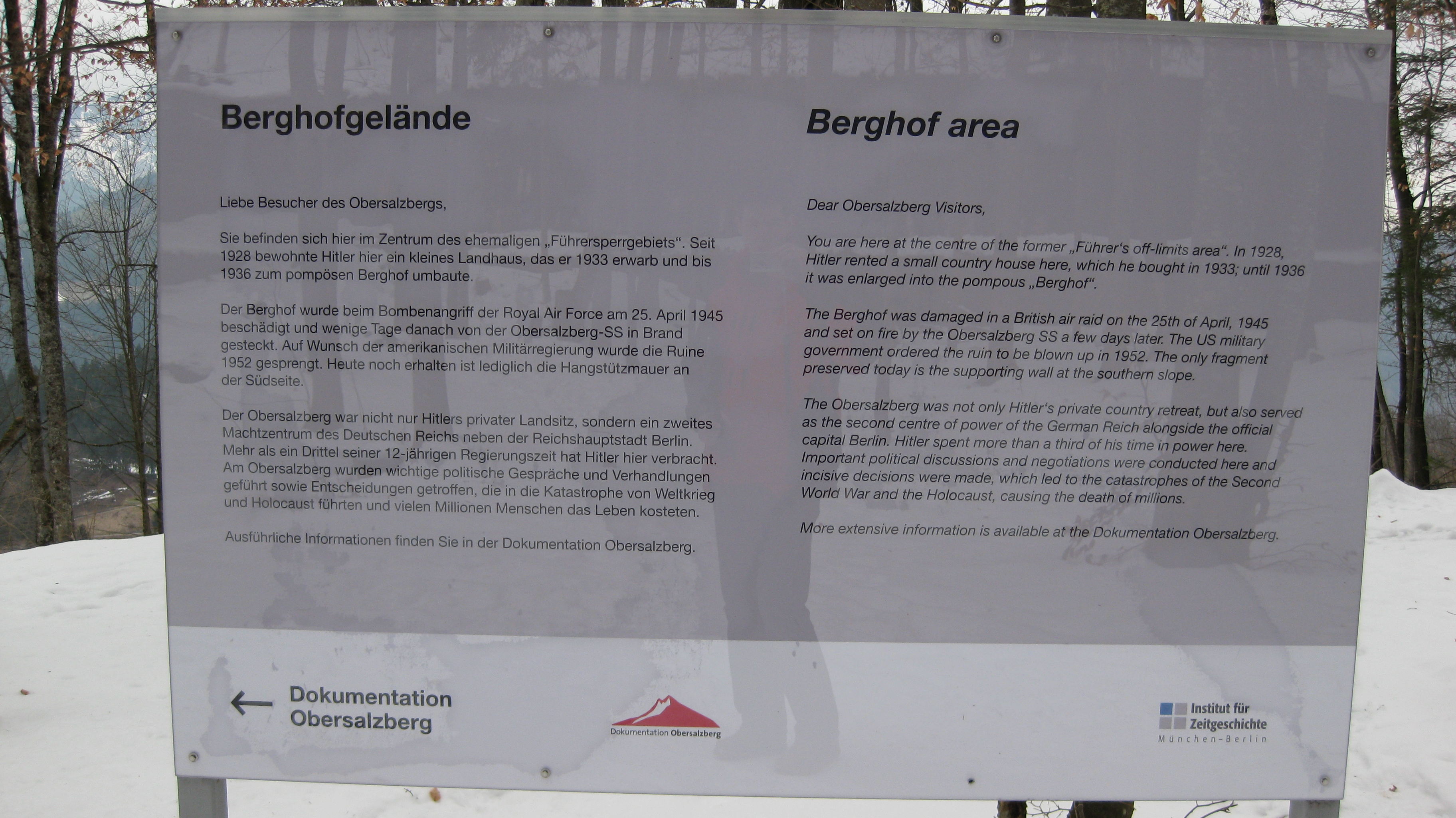 Seit kurzem befindet sich am ehem. Areal des Berghofs eine Hinweistafel.